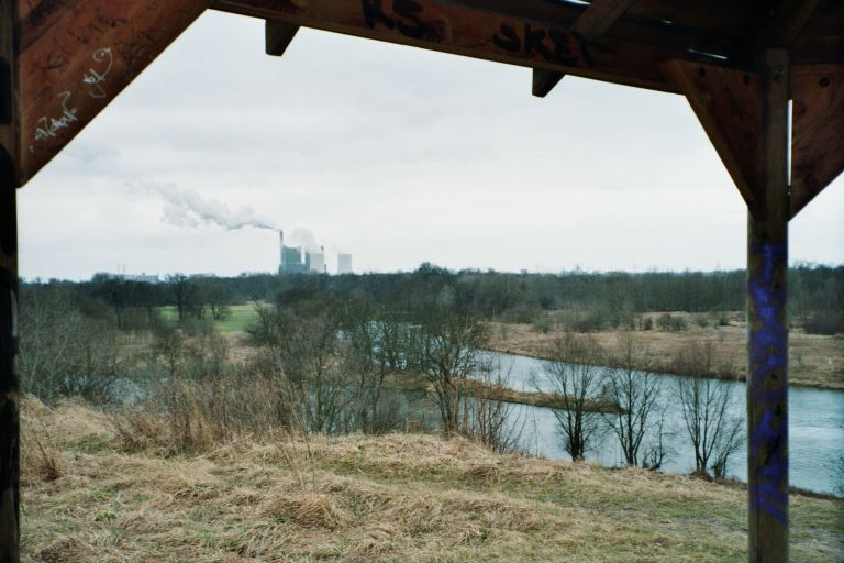 Mündung der Weißen Elster in die Saale, im Hintergrund das Braunkohlekraftwerk der E.ON AG in Schkopau